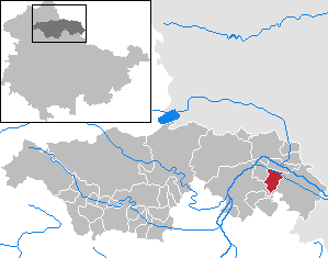 Gehofen in Thuringia - Kyffhäuserkreis